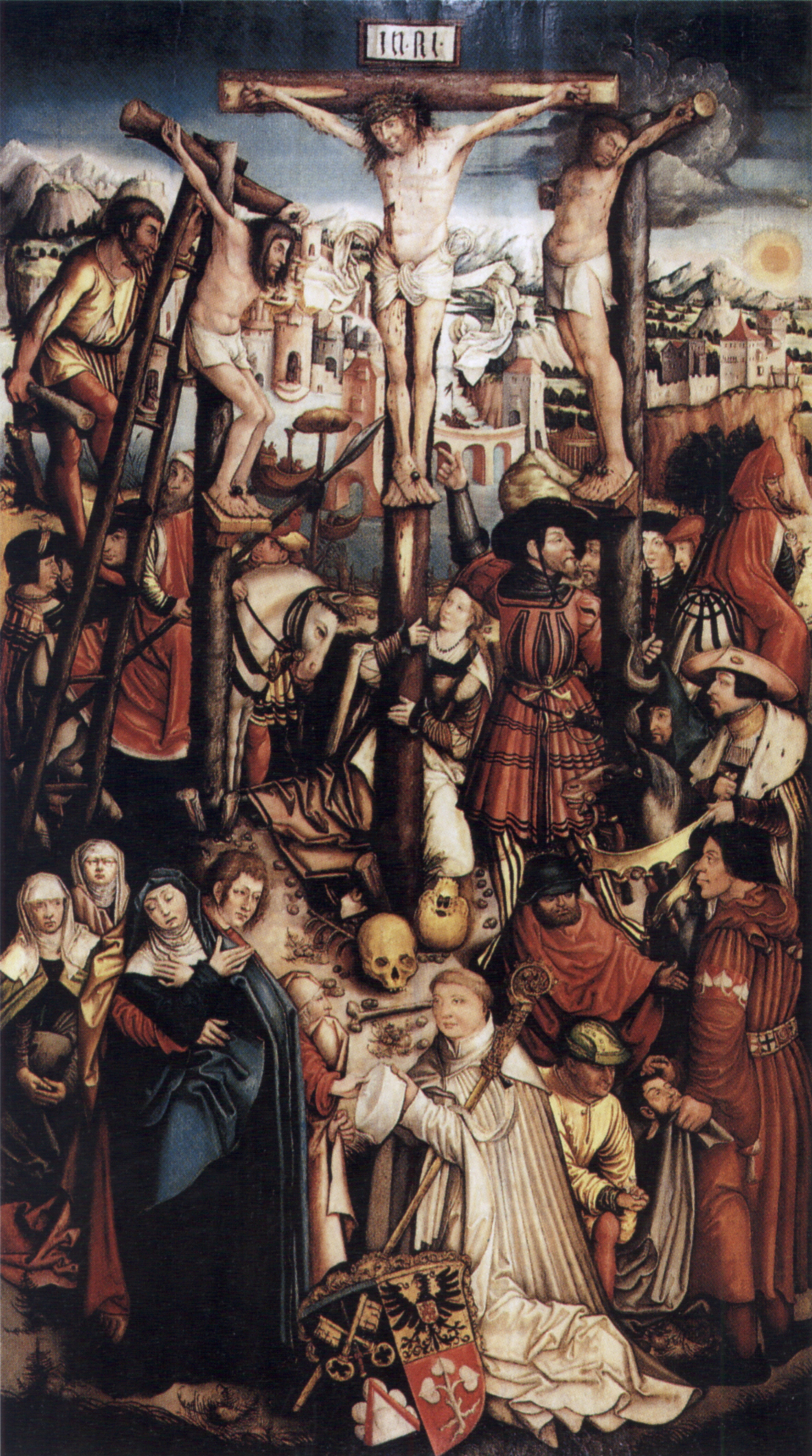 Kalvarienberg mit Stifterbild Jacob Murer, Abt von Weißenau; Öl auf Holz, 191,5 x 106 cm. Kunstsammlung der Stadt Ravensburg (1980 im Kunsthandel erworben)